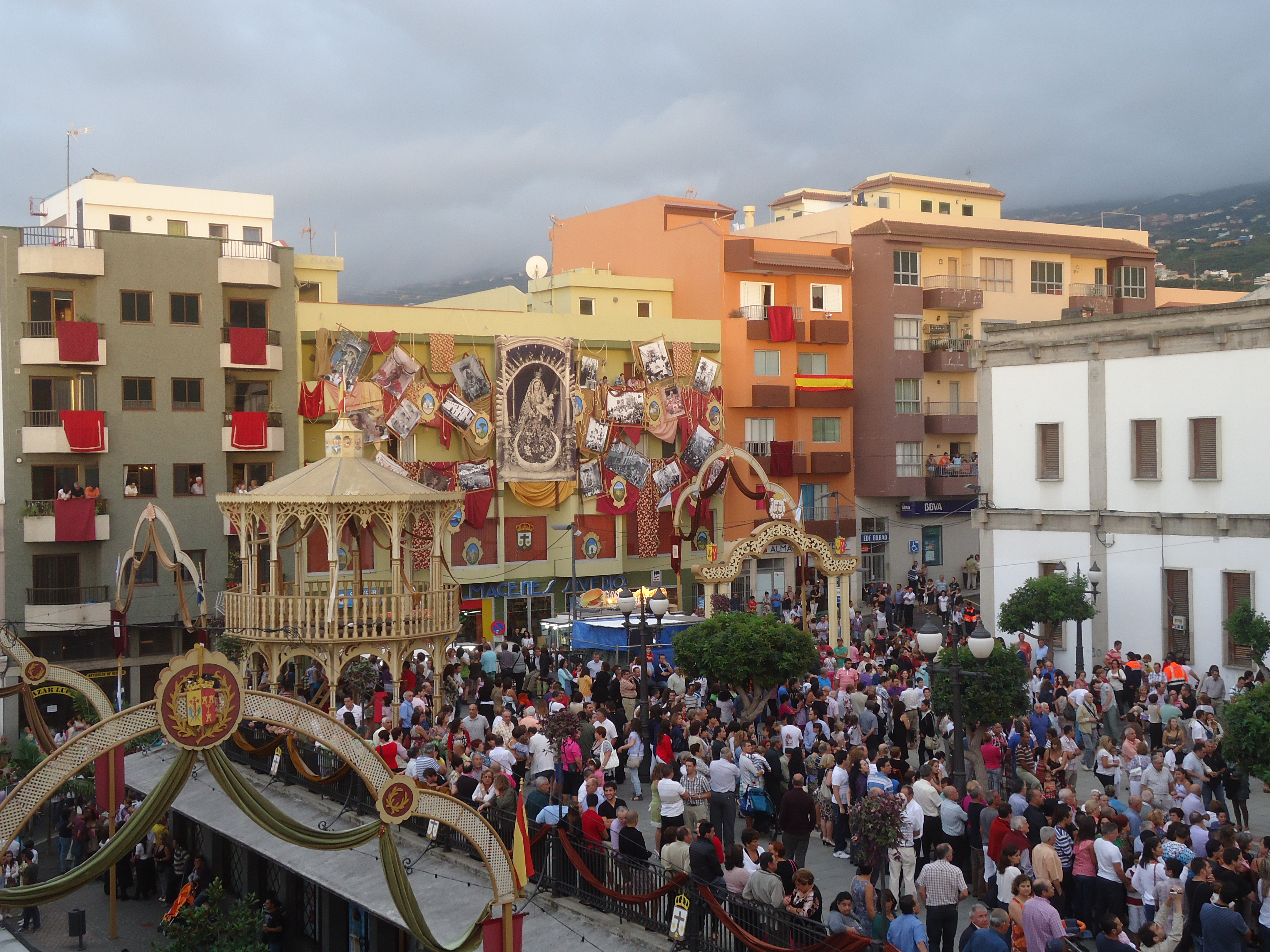 Plaza de San Agustín antes de la procesión de los Merineros de la Virgen del Carmen en Los Realejos.